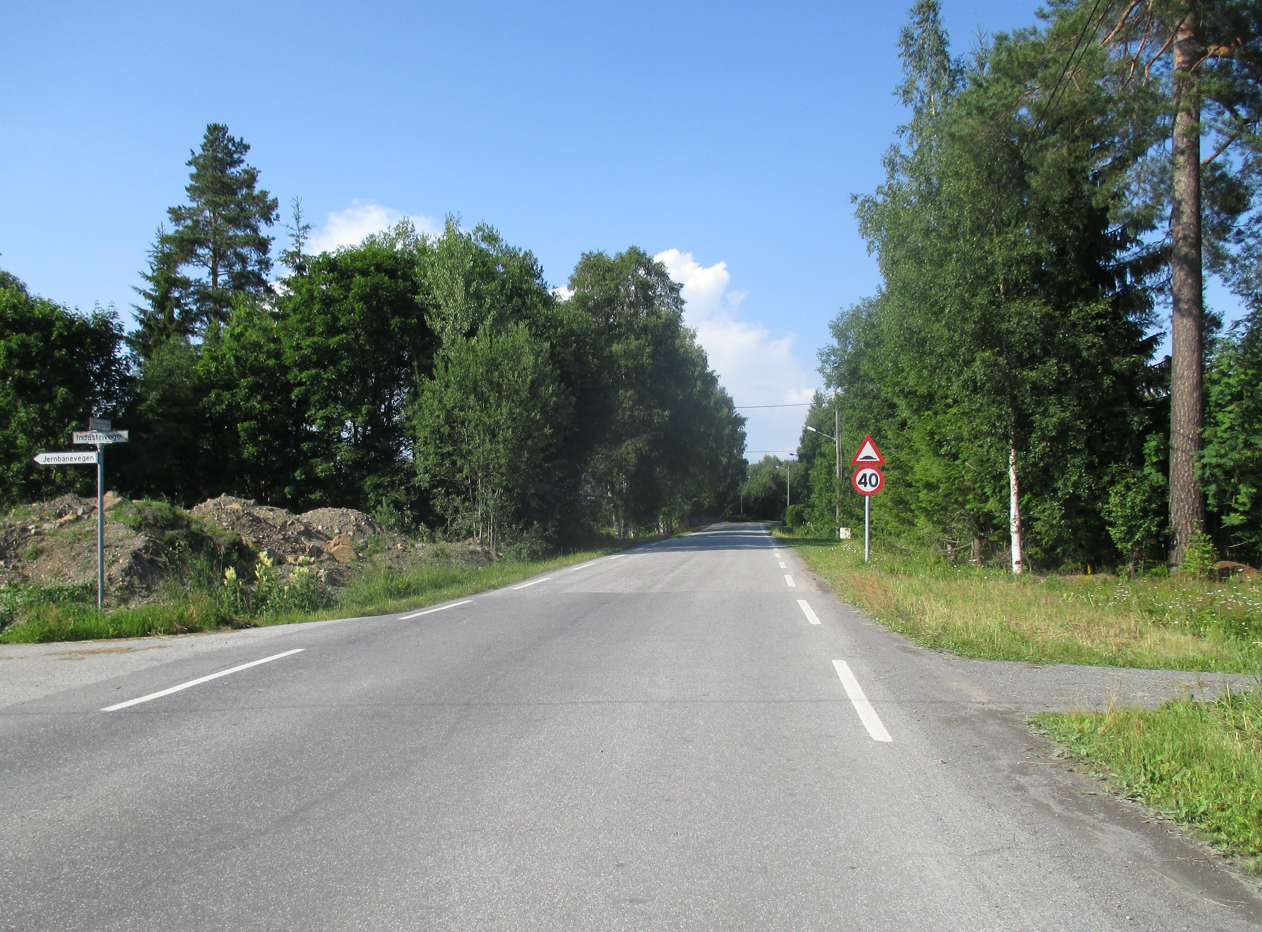 Storgata på Reinsvoll